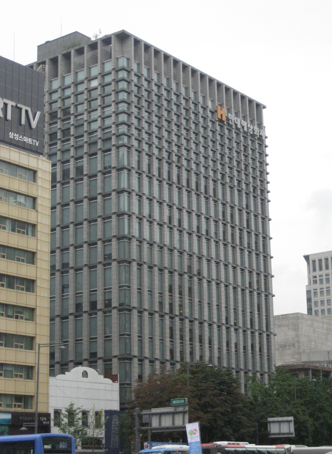 現代海上火災保険本社